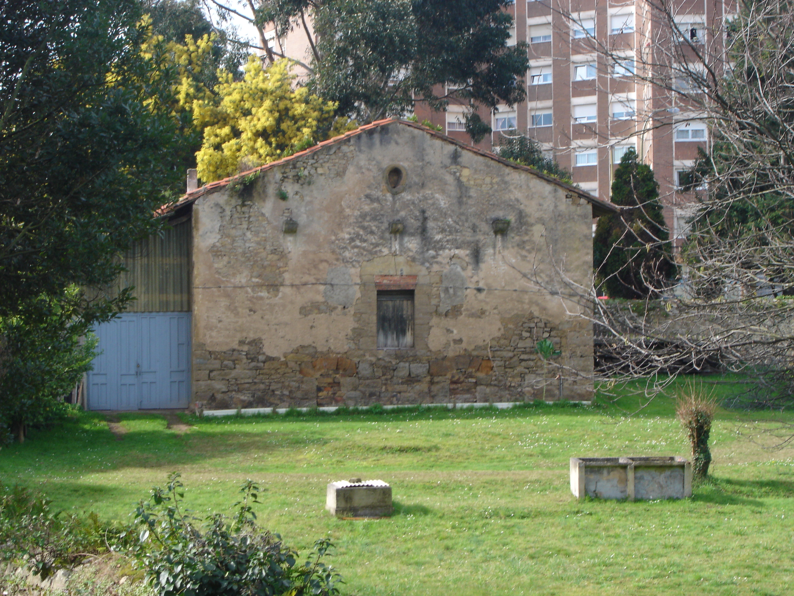 MartineteZaldúa